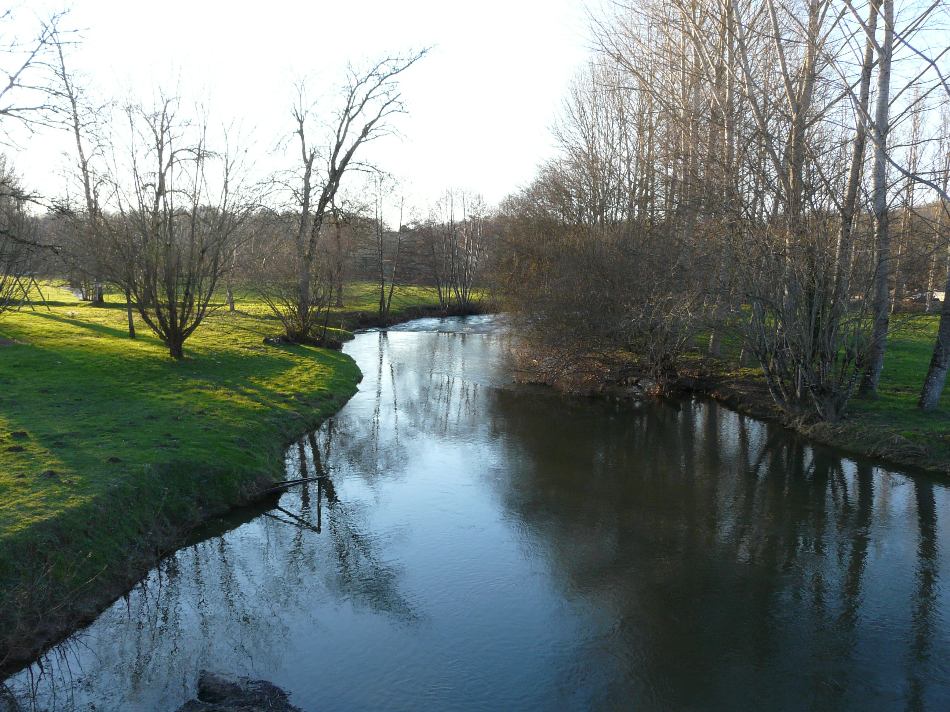 La Loue en aval du pont du bourg, Saint-Martial-d'Albarède, Dordogne, France.